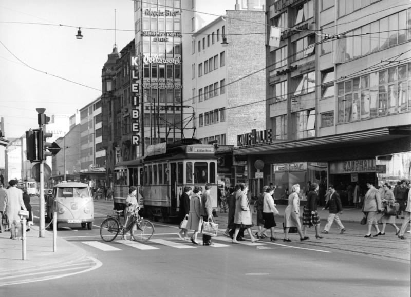 März 1961 Karlsruhe Straßenverkehr